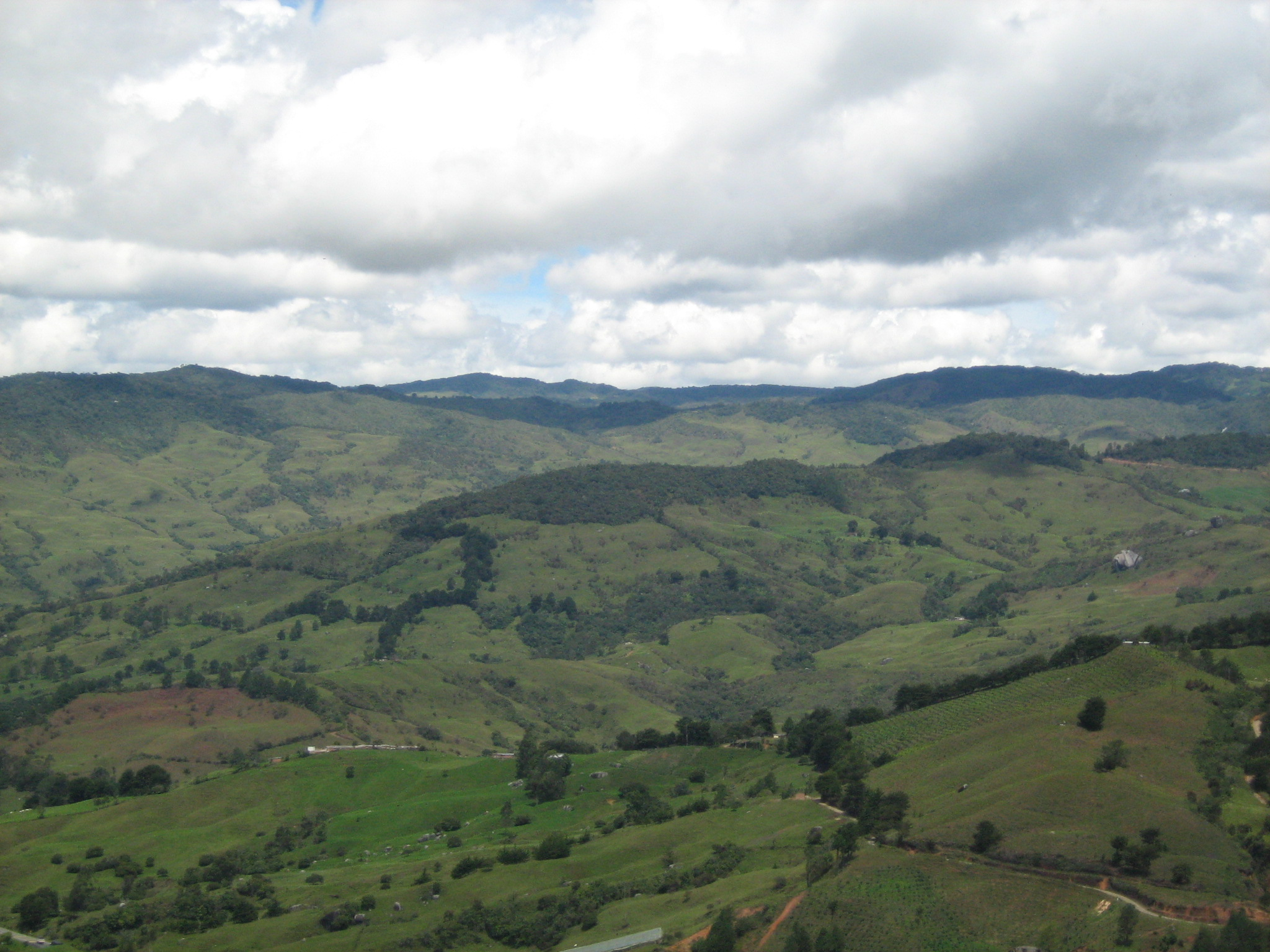 Vista de la geografía de Yarumal, Antioquia. Colombia.